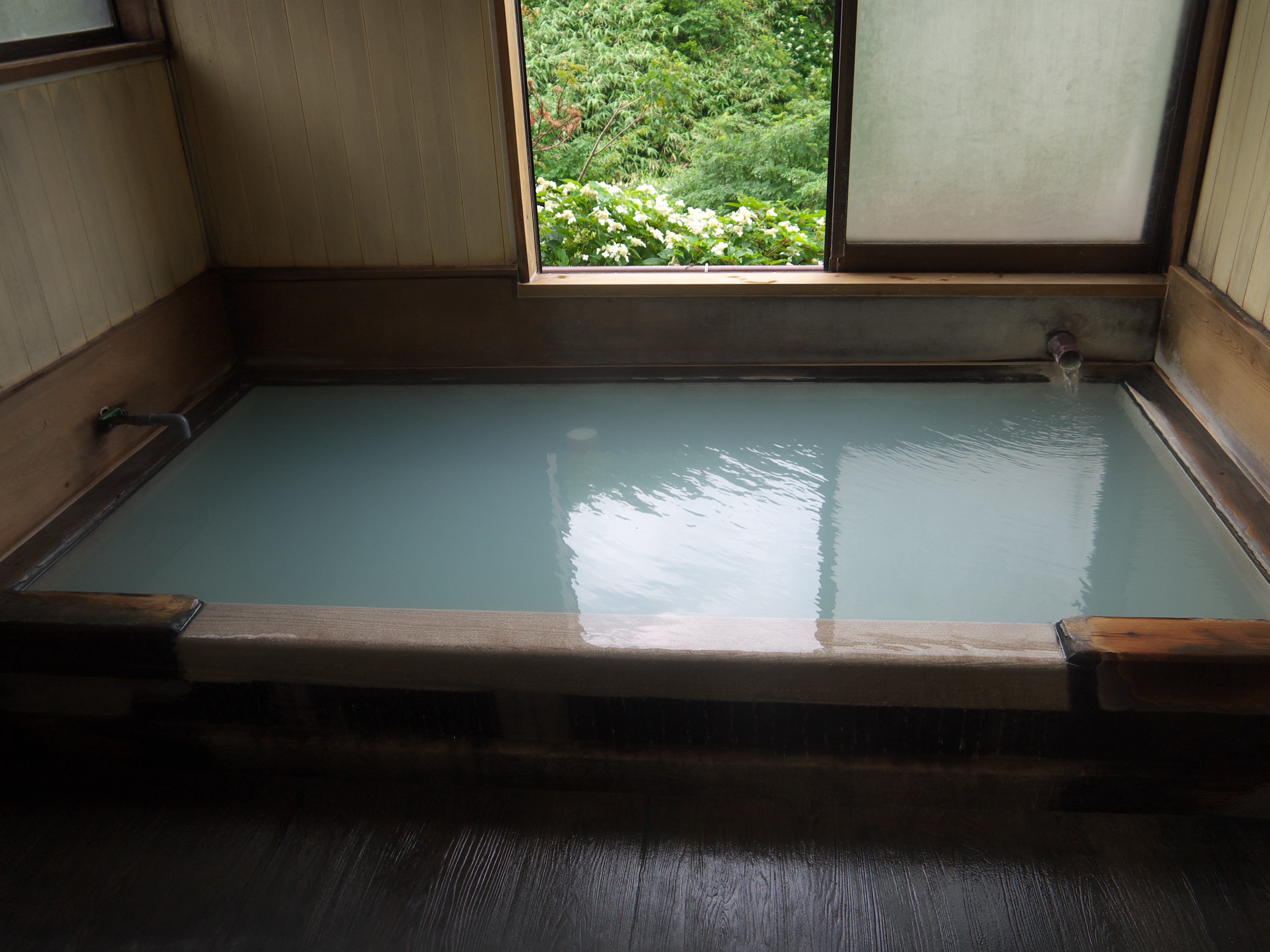 くろがね温泉浴槽